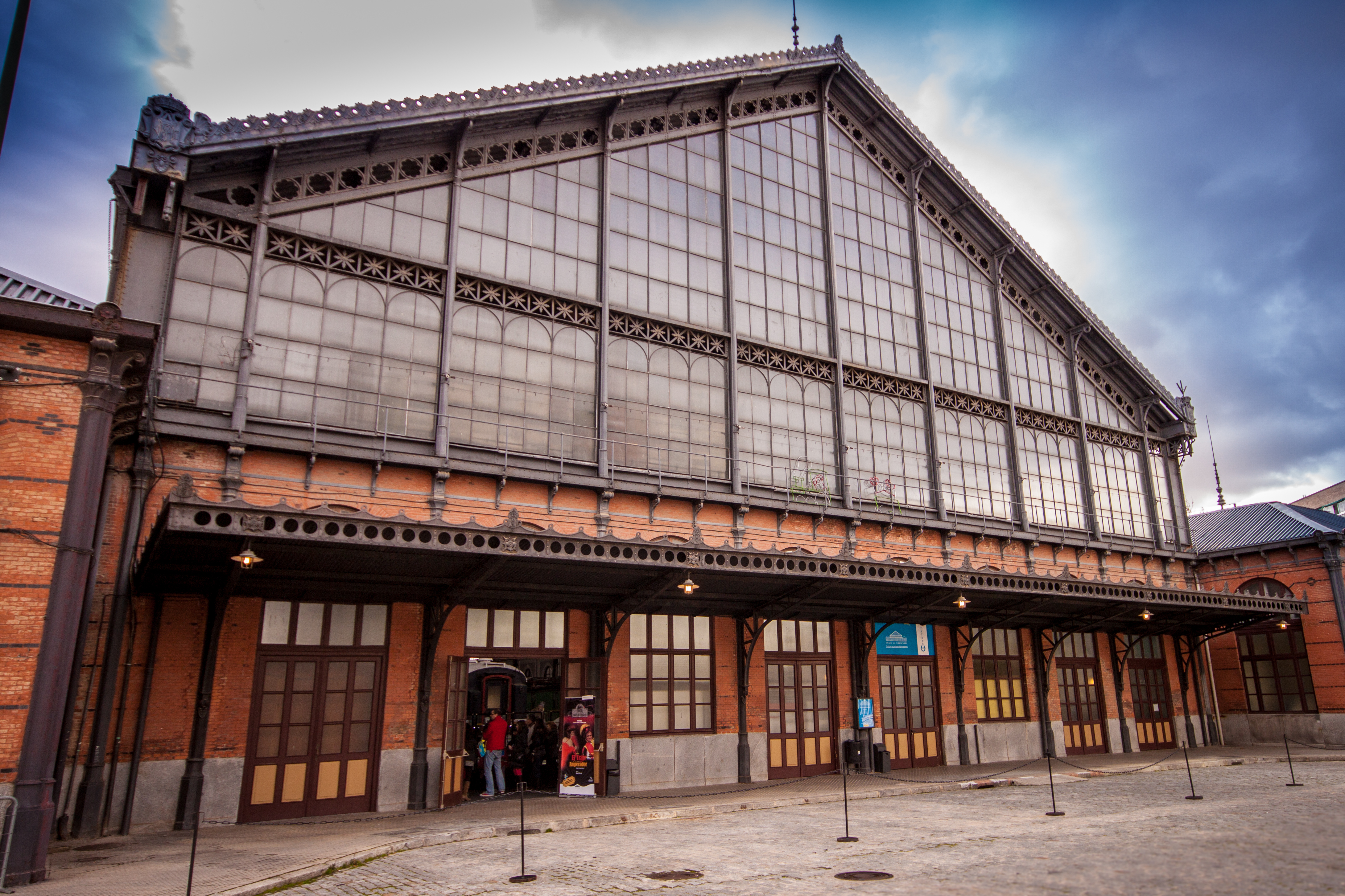 Fachada de la antigua estación Delicias de Madrid, actual sede del Museo del Ferrocarril.